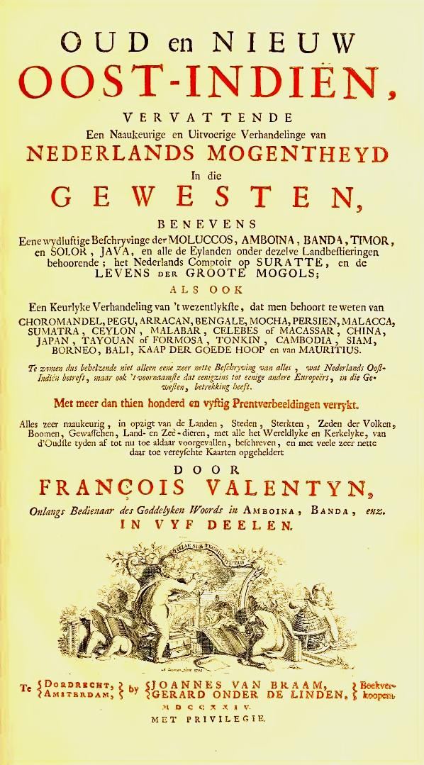 Francois Valentijn